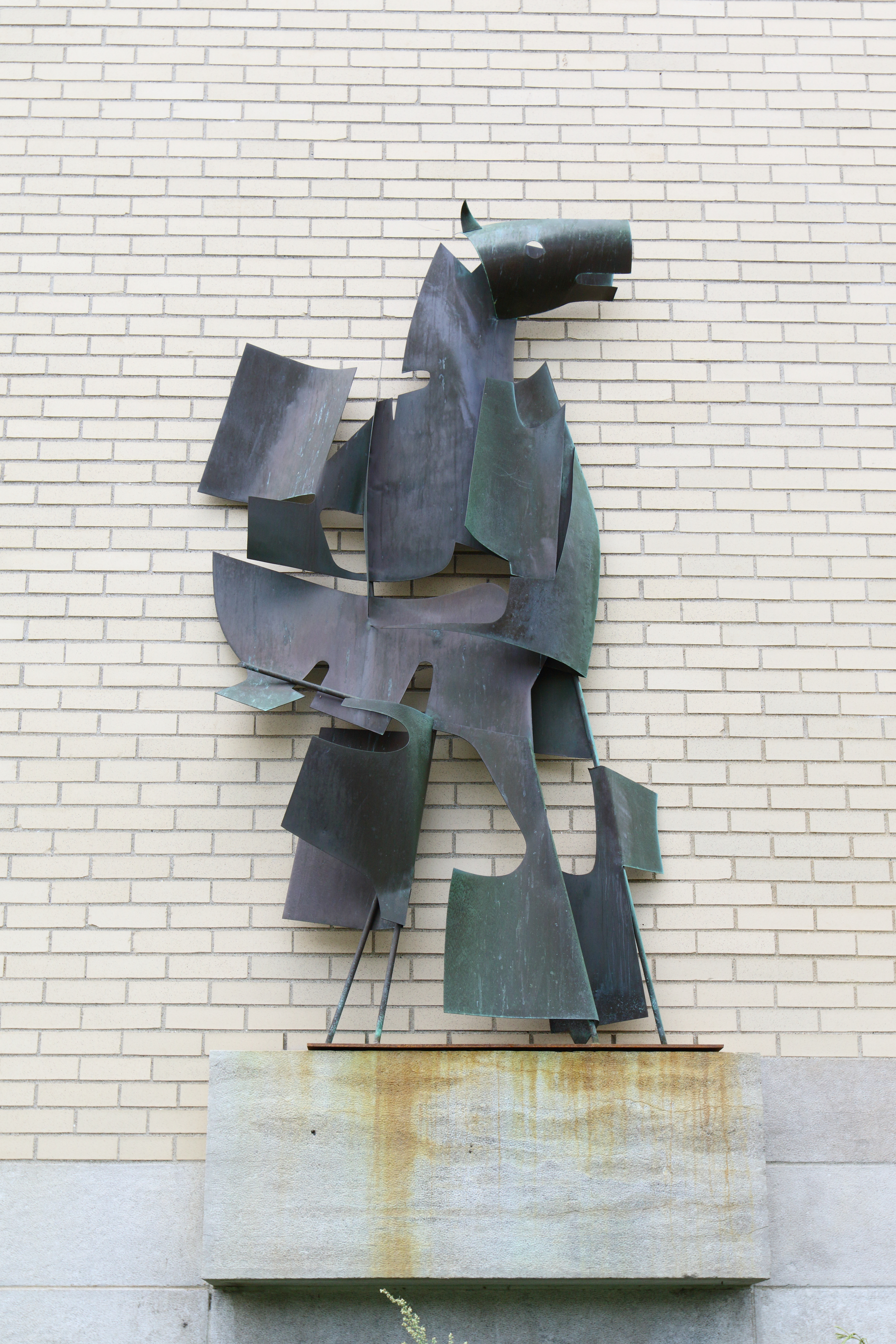 La sculpture représente un hippogriffe soit cet animal fantastique, moitié cheval, moitié griffon, tiré des romans médiévaux de chevalerie.